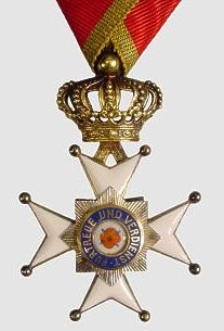 Lippischer Hausorden.